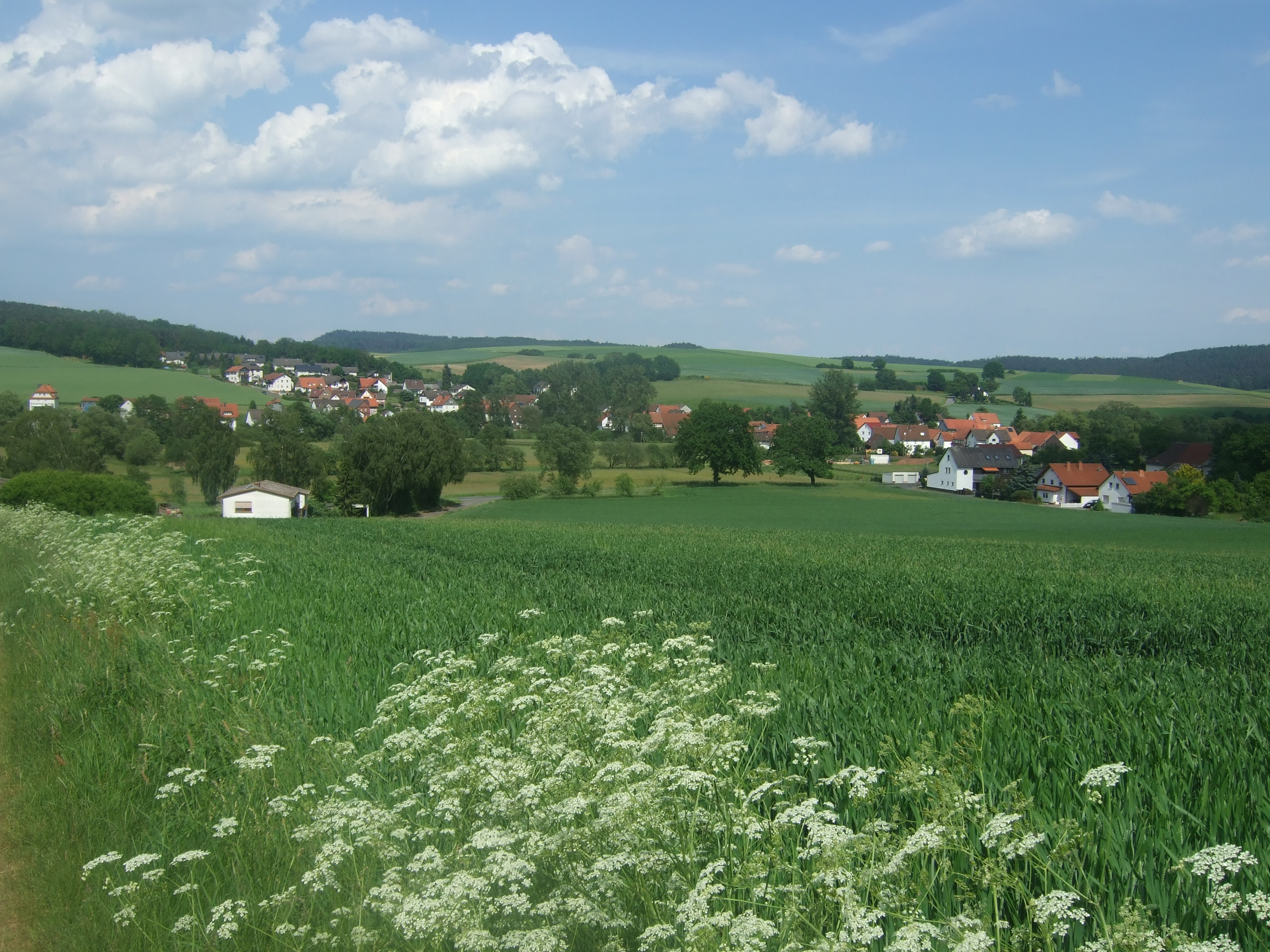 Blick auf das Dorf Niederwetter, Wetter (Hessen)